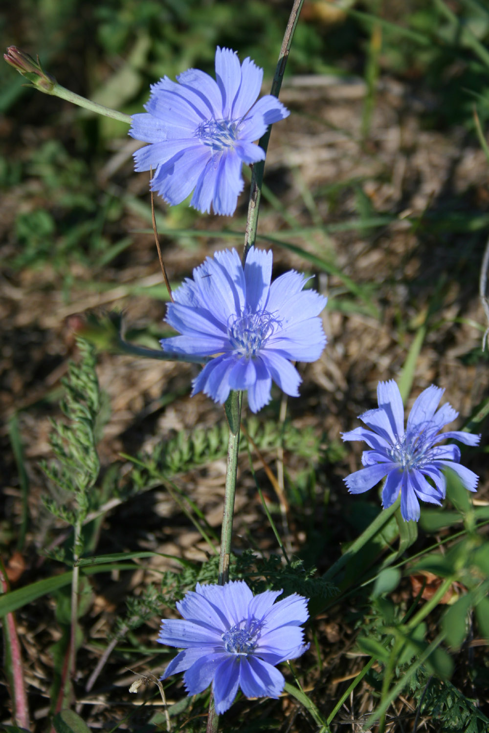 Photo by Seweryn Olkowicz Taken in Slovakia